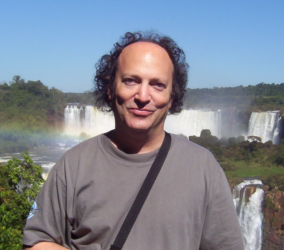 Fuzzbee Morse at Igaçu Falls in Brazil